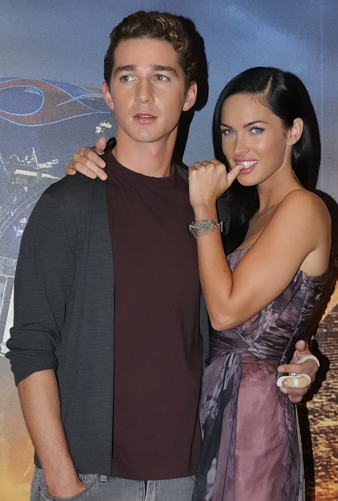 Megan Fox et Shia Labeouf au Georges V à Paris, pour la promo du film Transformers 2 : la revanche